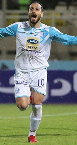 روح‌الله باقری